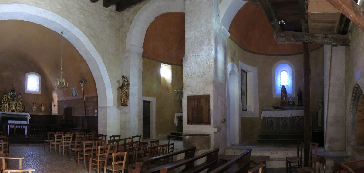 Église Saint-Germain de Creysse (département du Lot)